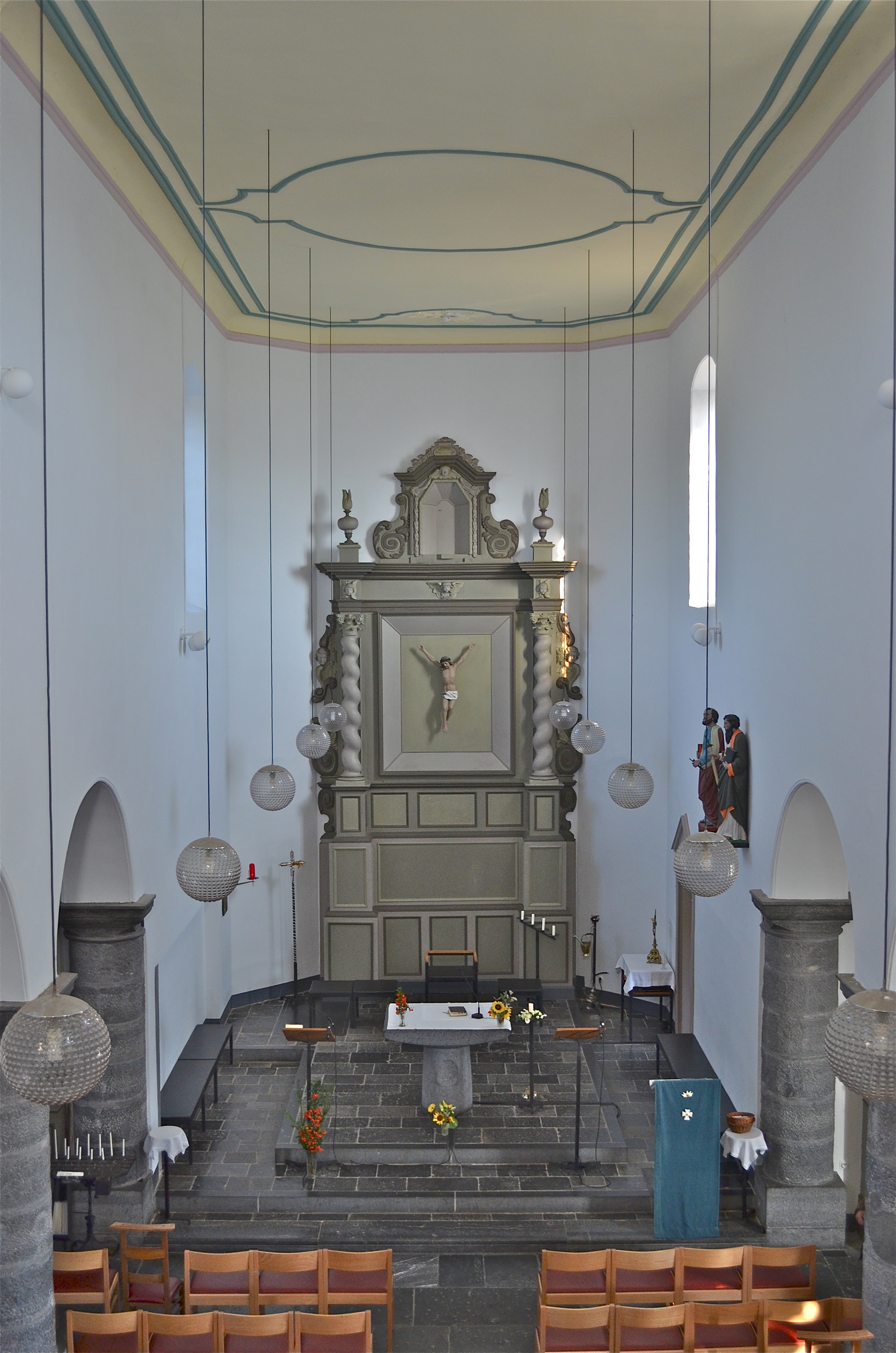 Choeur.